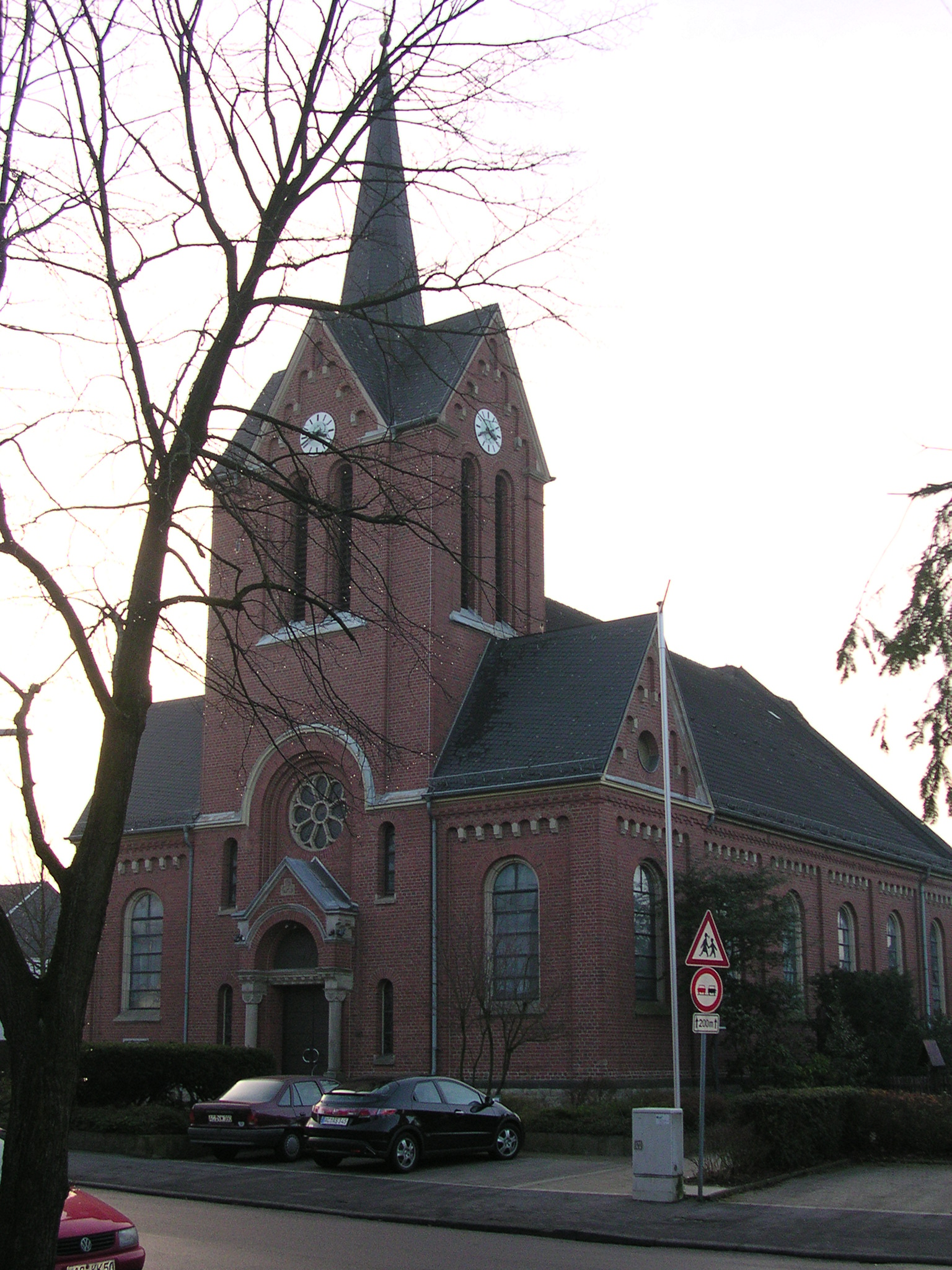 Stolberg Münsterbusch, rk. Pfarrkirche “Herz Jesu”